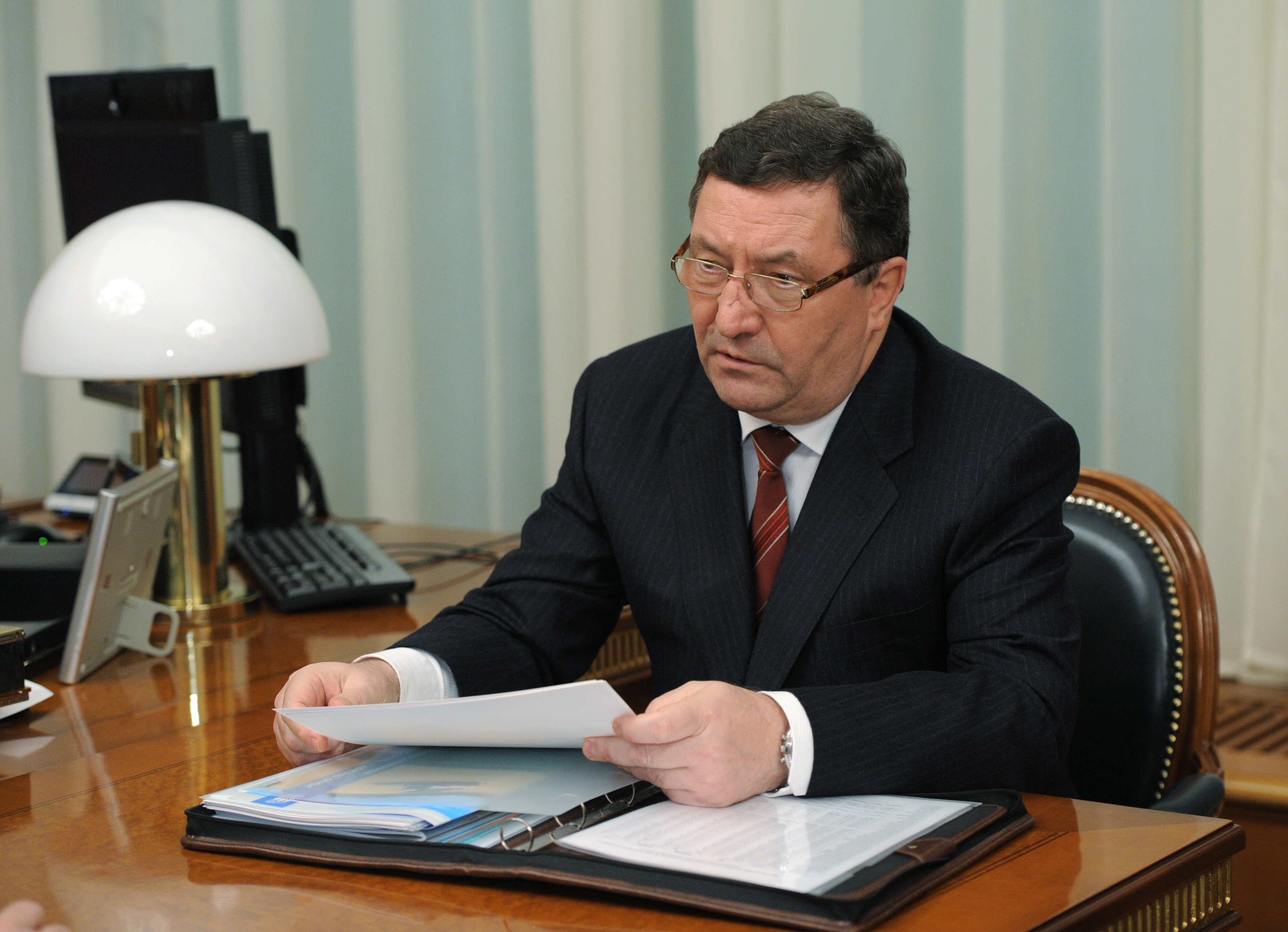 Глава администрации Тамбовской области О.И.Бетин на встрече с Председателем Правительства Российской Федерации В.В.Путиным